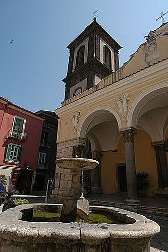 Piazza Duomo e atrio della Cattedrale di Sant'Agata de' Goti (BN)